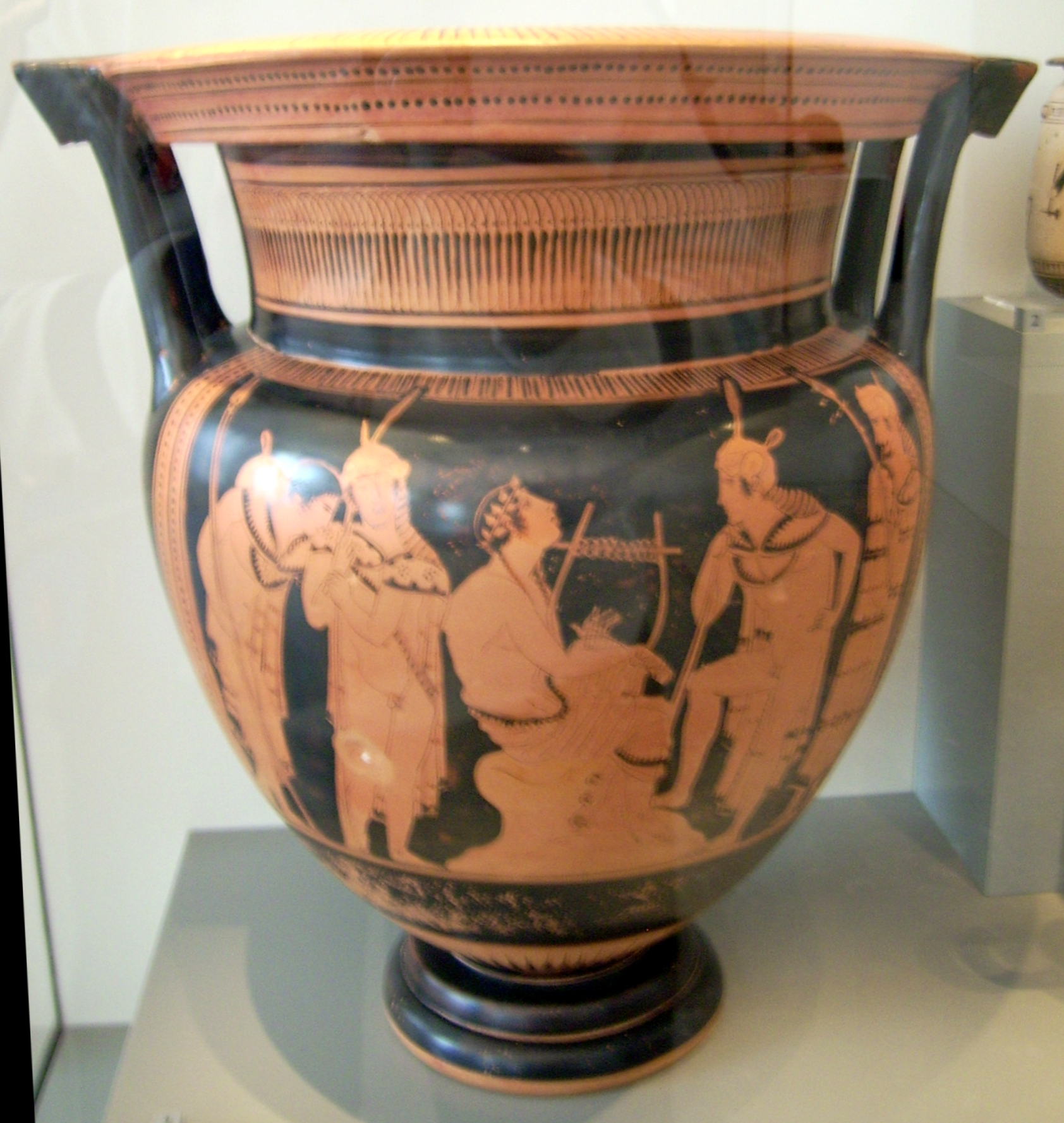 attisch-rotfiguriger Kolonettenkrater des Orpheus-Malers, Namenvase, um 450/40 v. Chr., Antikensammlung Berlin/Altes Museum, Inv.-Nr. V.I. 3172, Höhe 50,5 cm